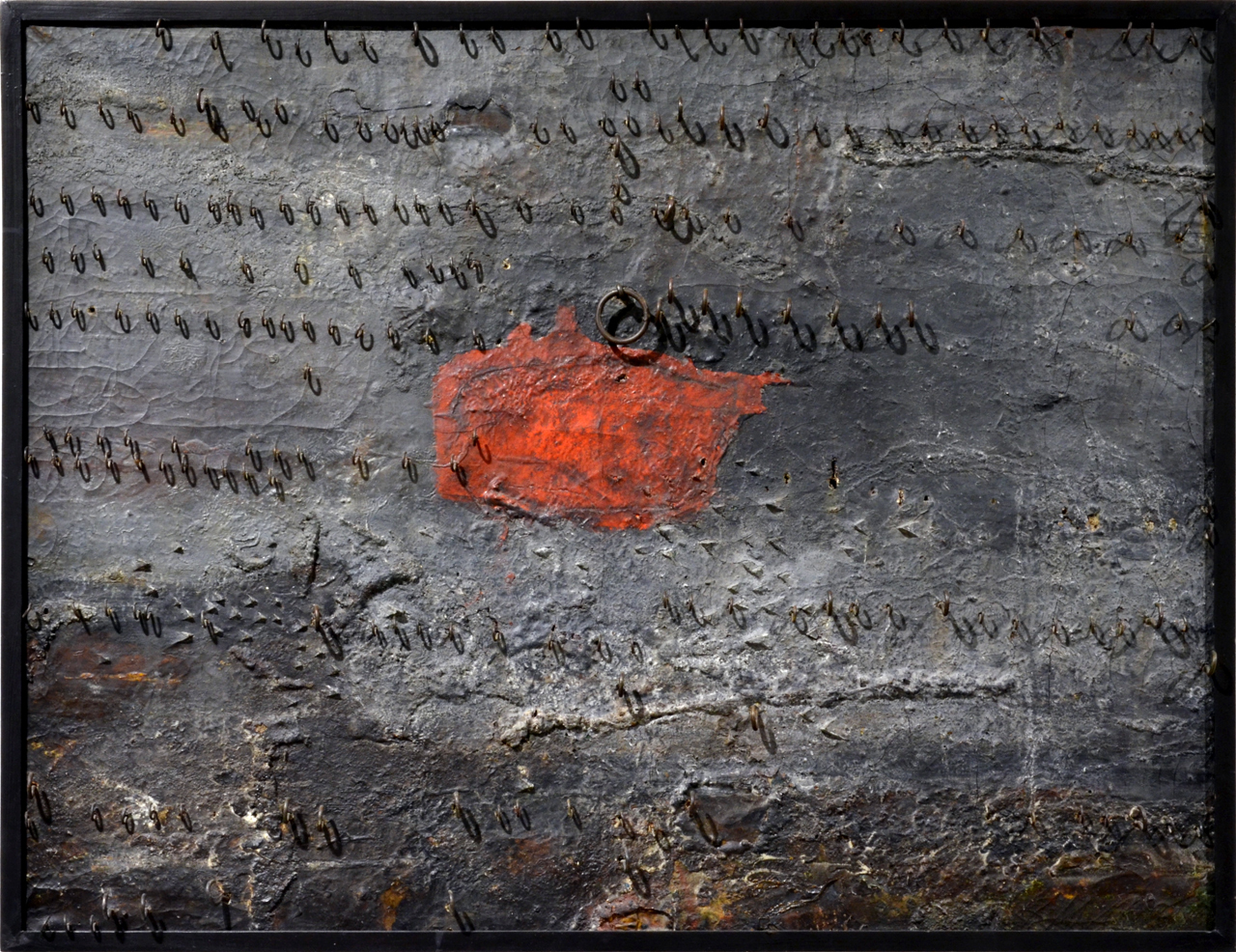 Bedřich Dlouhý, Zeď (1960), asambláž, lakované železné háčky, plátno, Oblastní galerie v Liberci